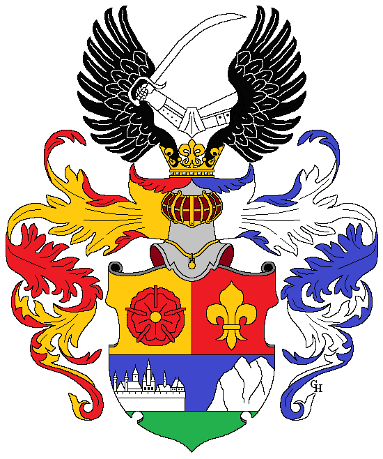 Wappen des österreichischen Obersten Joseph Maria Niembsch (1752–1822), verliehen anlässlich seiner Erhebung in den österreichischen Adelsstand als "Edler von Strehlenau" 1820. Zeichnung von Gerd Hruška ( Für weitere Informationen zu dieser Standeserhebung siehe (